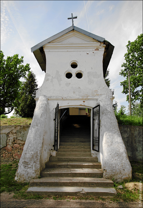 Струбніца. Брама